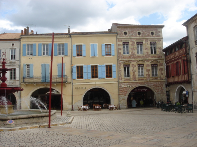 Place et fontaine, maison XVIIe siècle de Villeneuve-sur-Lot